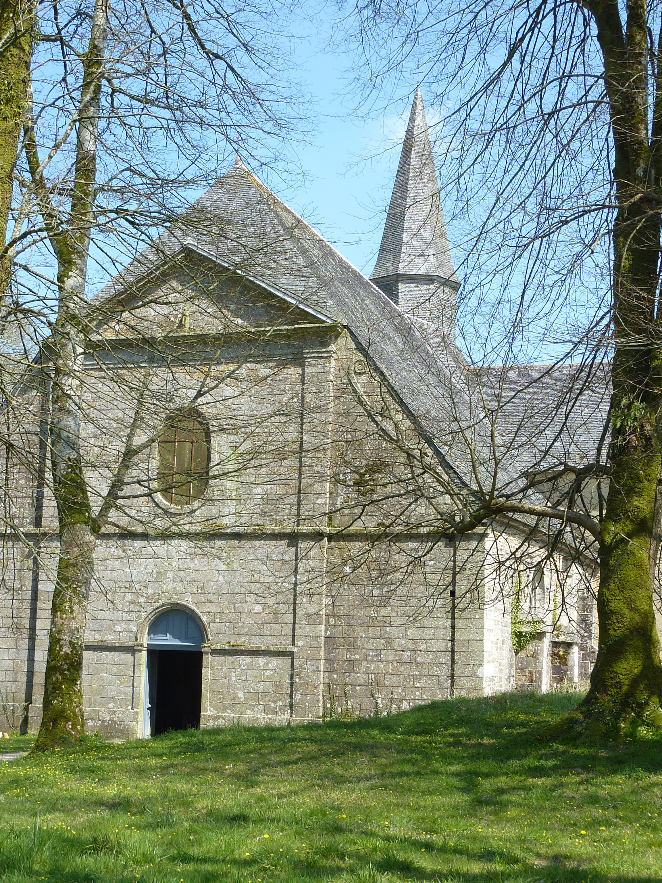 Façade occidentale de l'abbatiale du Relec en Plounéour-Ménez (29).